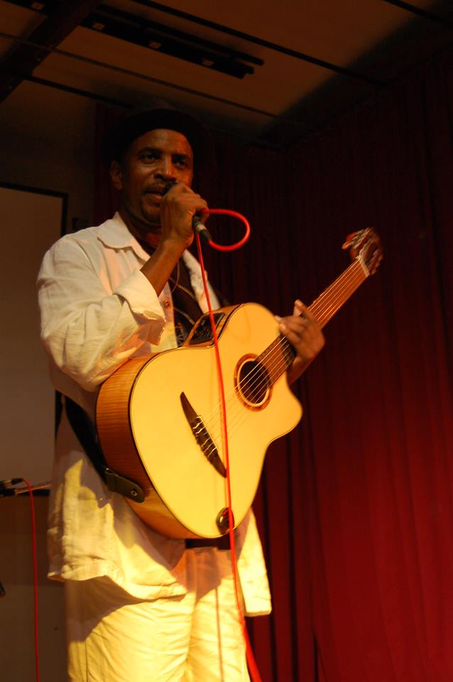 Musico